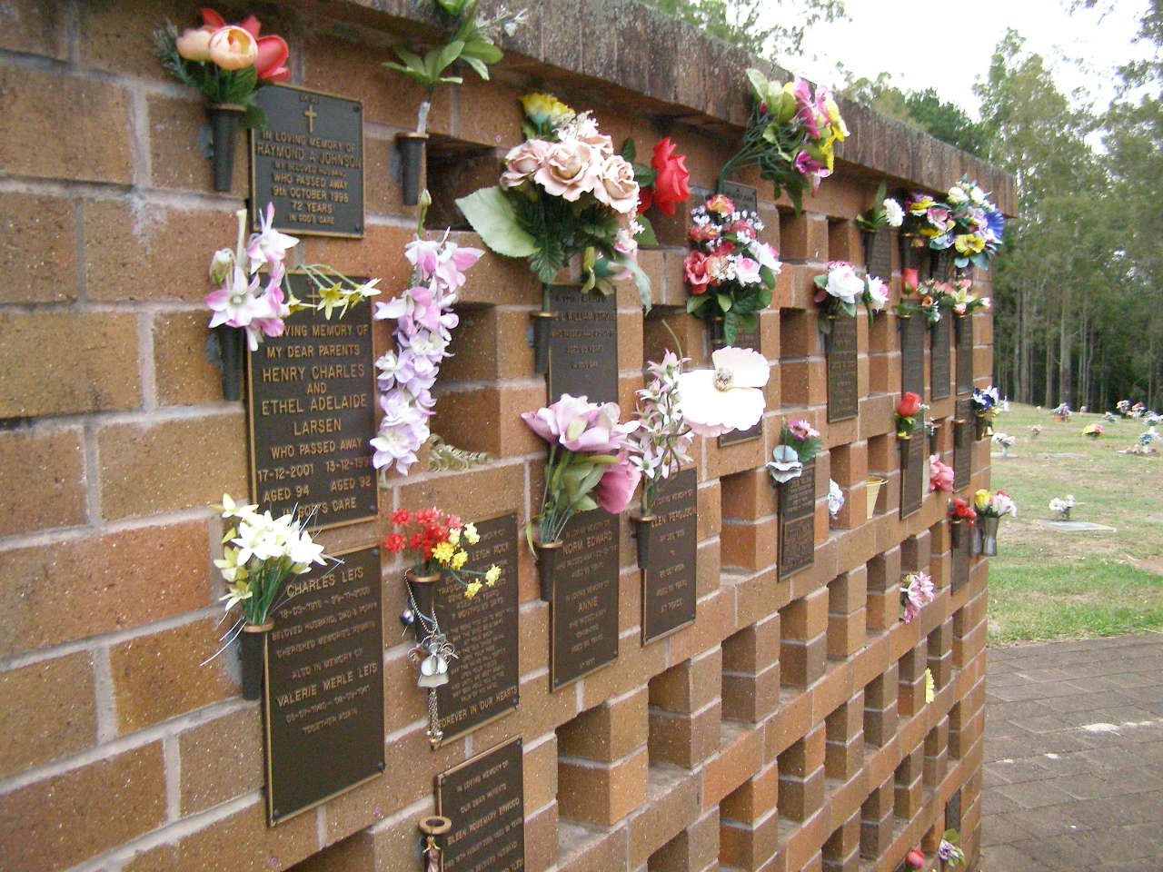 Lawnton columbarium